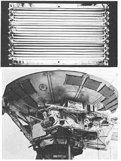 Pioneer 10 - Meteoroid Detectors